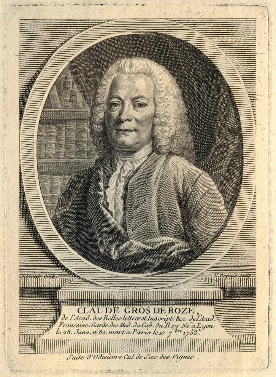 Portrait de Claude Gros de Boze - 1680 - 1753